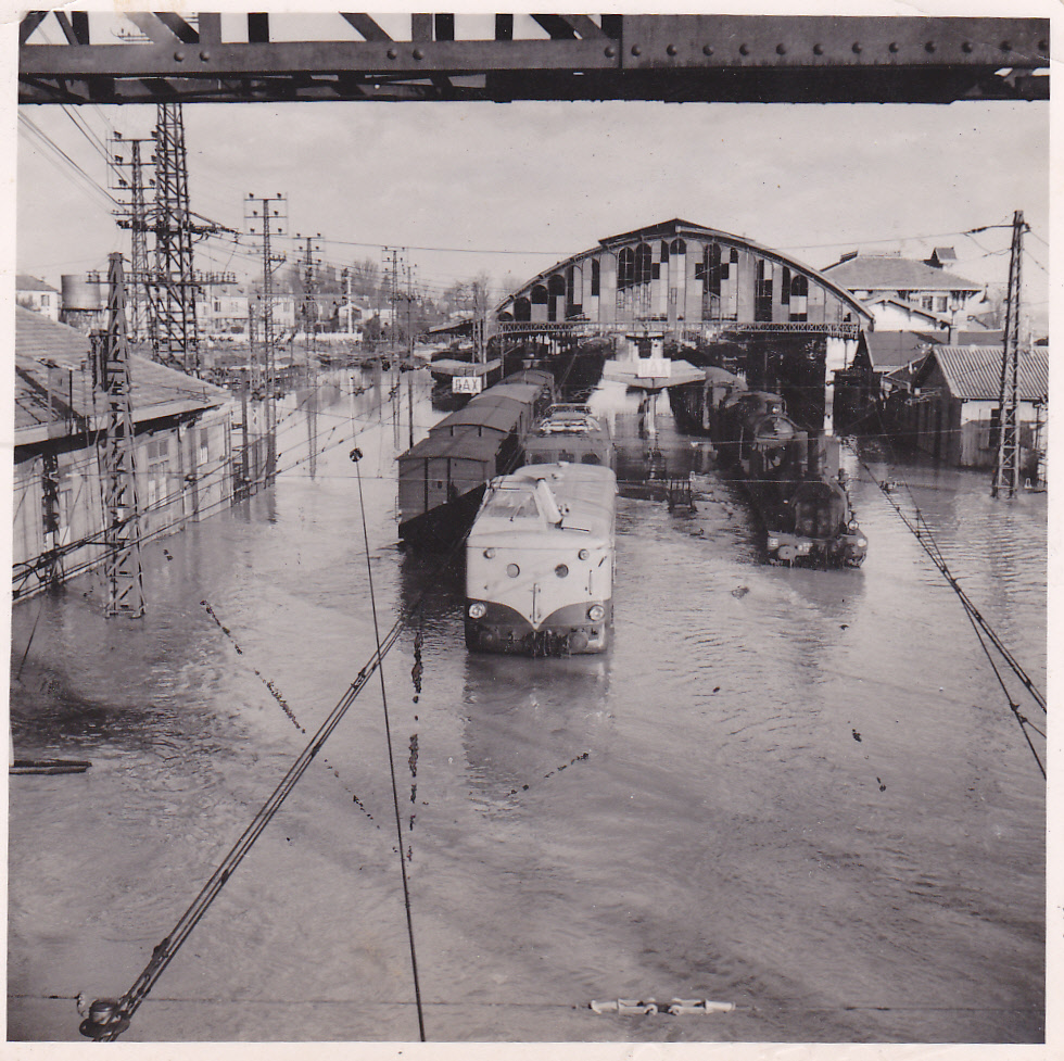 Dax (Landes, France) : La gare inondée.